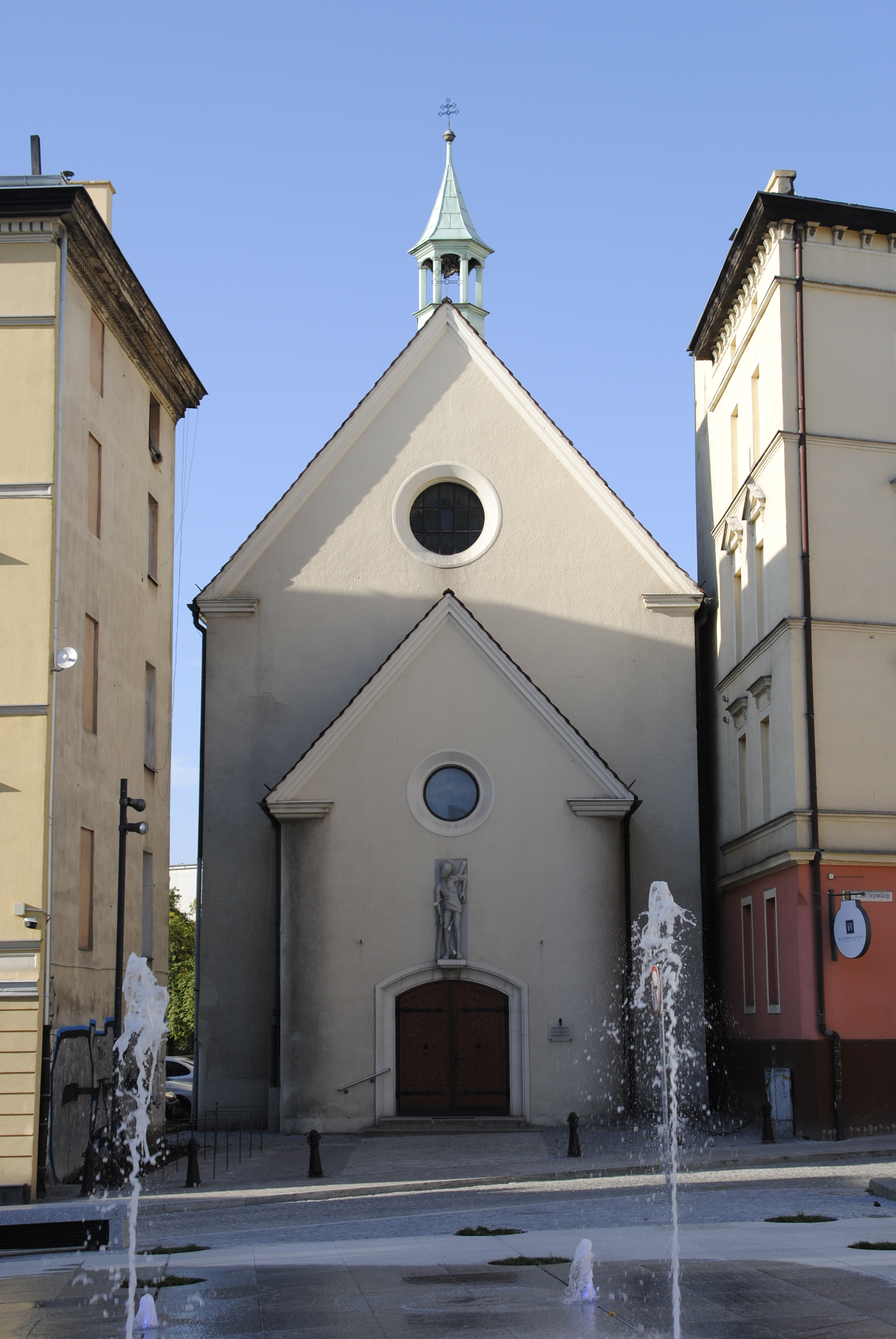 Kirche des heiligen Sebastian in Oppeln